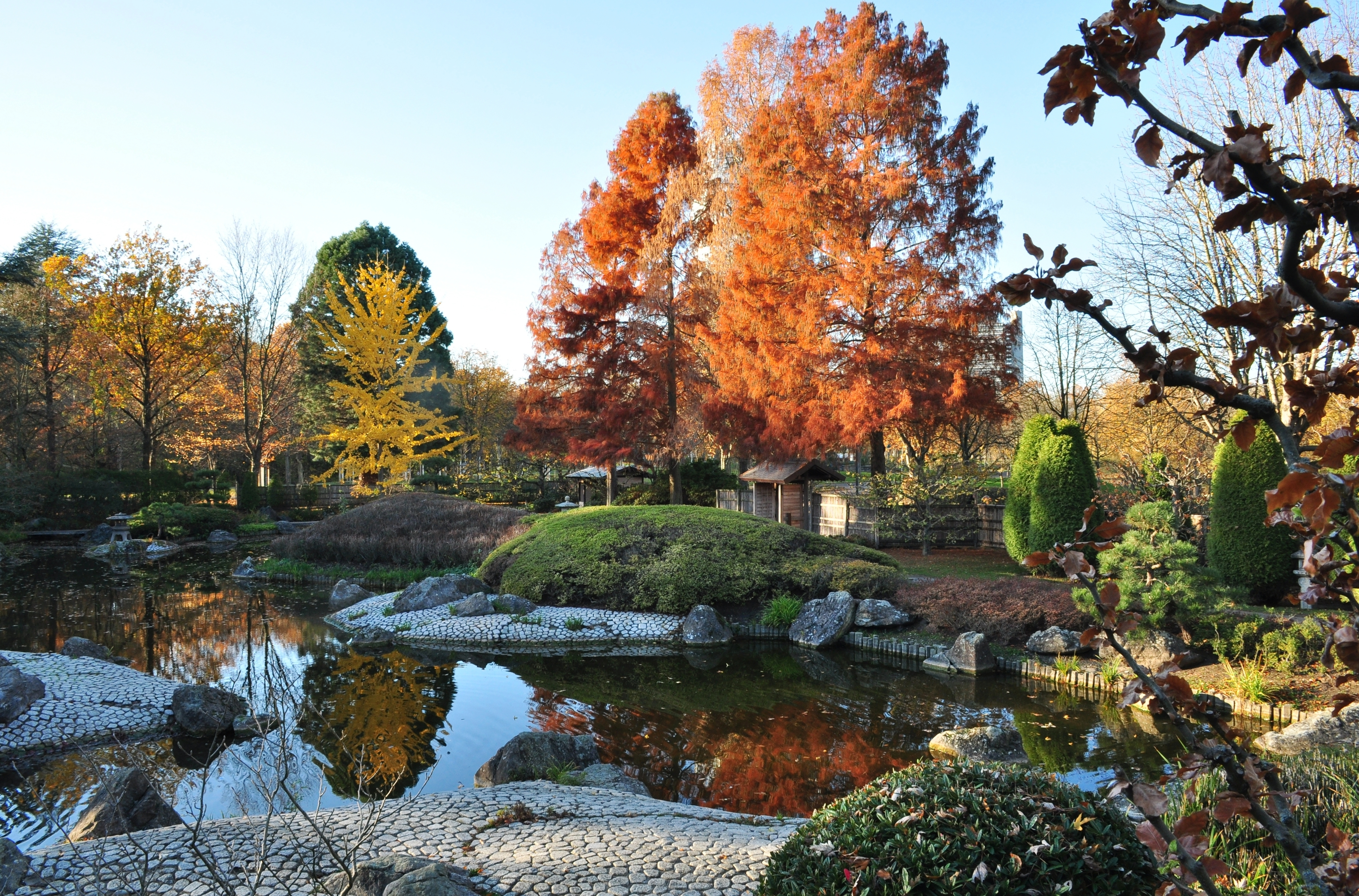 Japanischer Garten in der Bonner Rheinaue – Herbst 2018